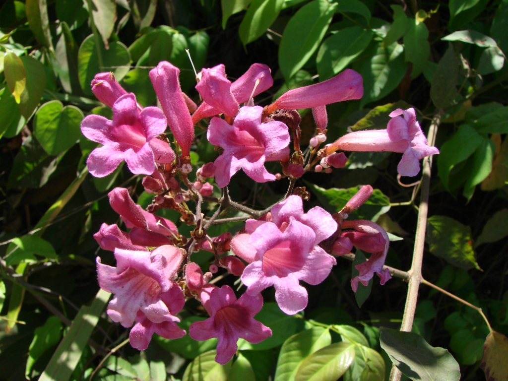 Fridericia chica (Bonpl.) L.G.Lohmann - (sin. hom. Arrabidaea chica (Bonpl.) Verl.) - BIGNONIACEAE - Parque Olhos D'Água - Brasília - Distrito Federal - Brasil.